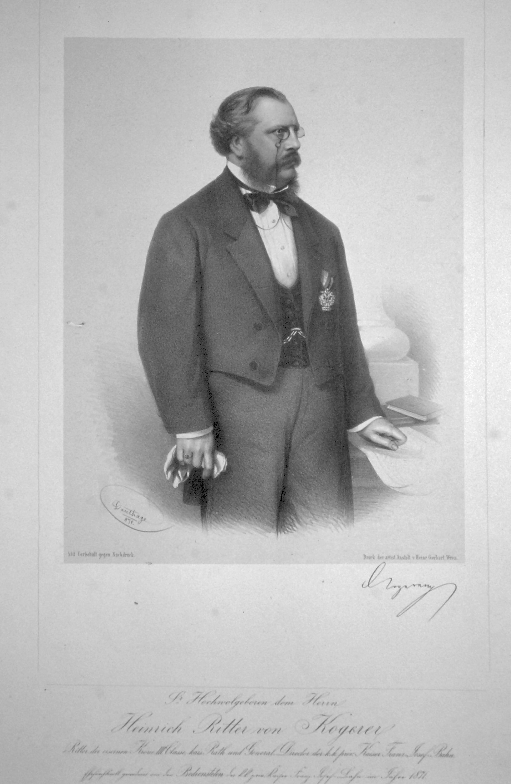 Heinrich von Kogerer (1819-1899), Hofrat, Generaldirektor der Kaiser Franz-Josephs-Bahn. Lithographie von Adolf Dauthage, 1871.